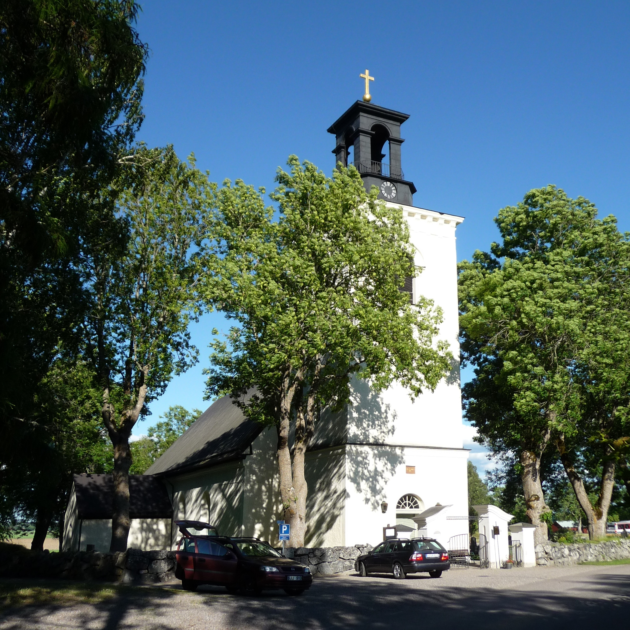 Frösthults kyrka